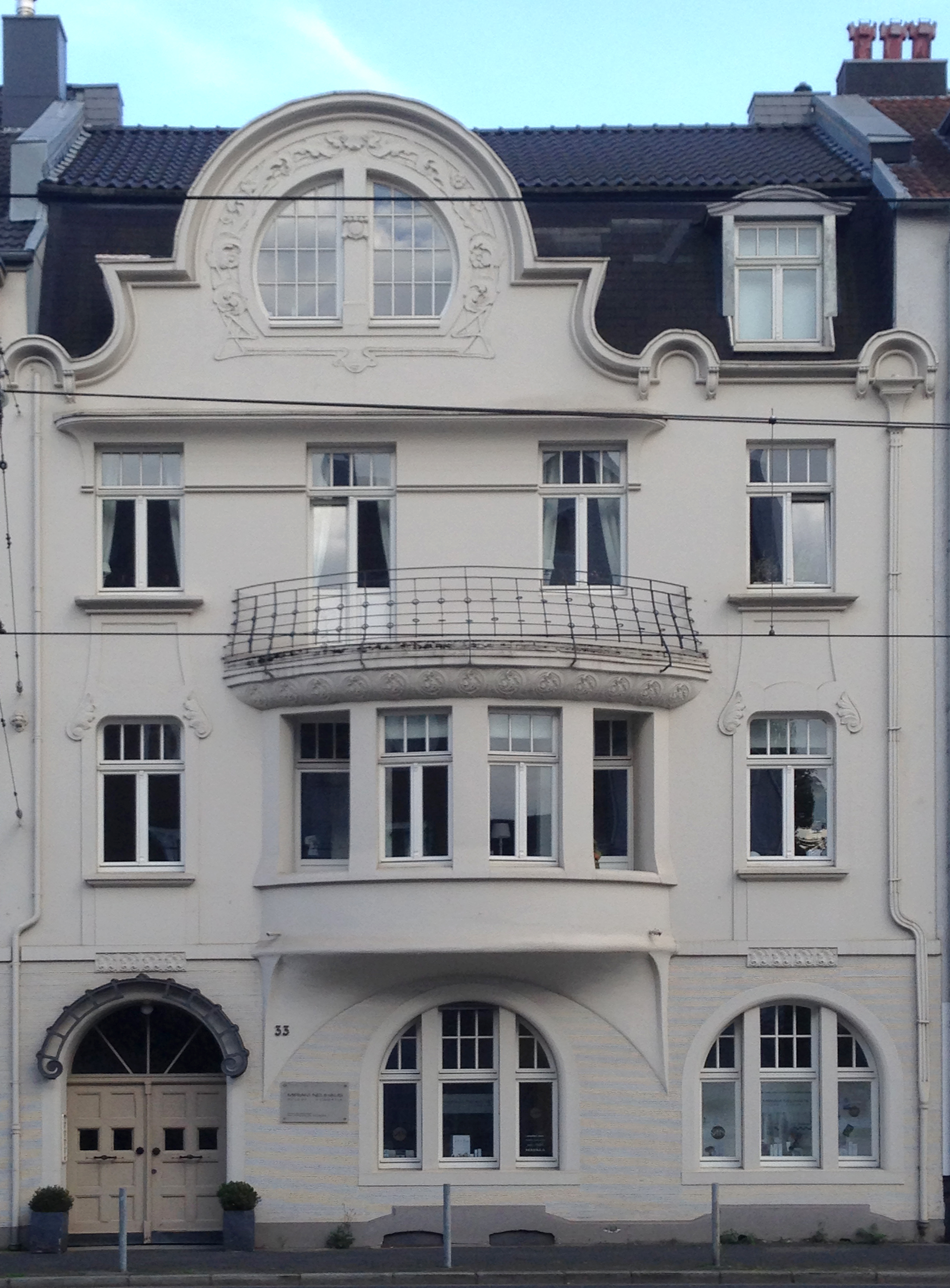 Haus Belsenstraße 33, Düsseldorf-Oberkassel, Architekt Rudolf Wilhelm Verheyen (1878–1915)